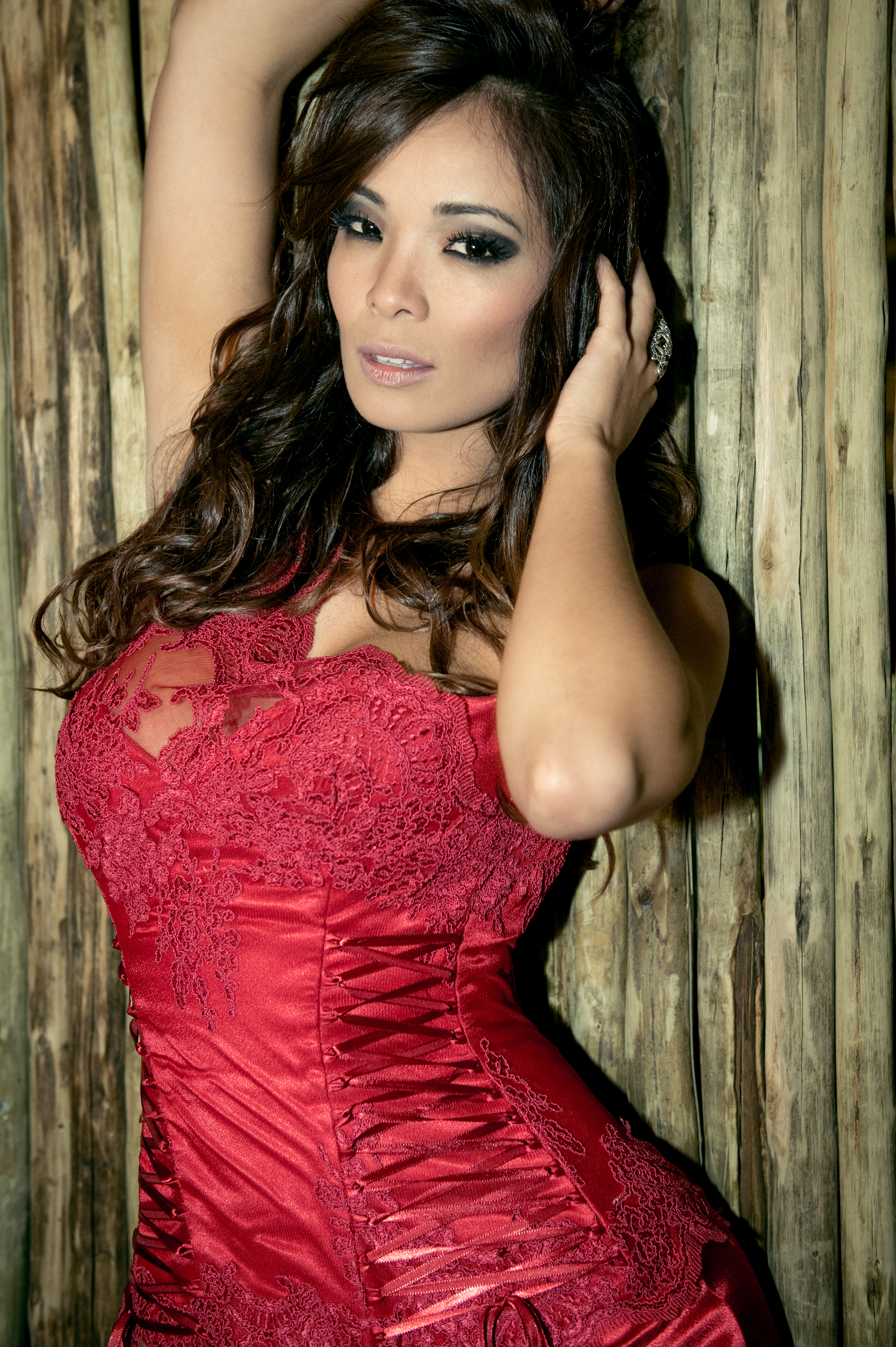 Carol Nakamura